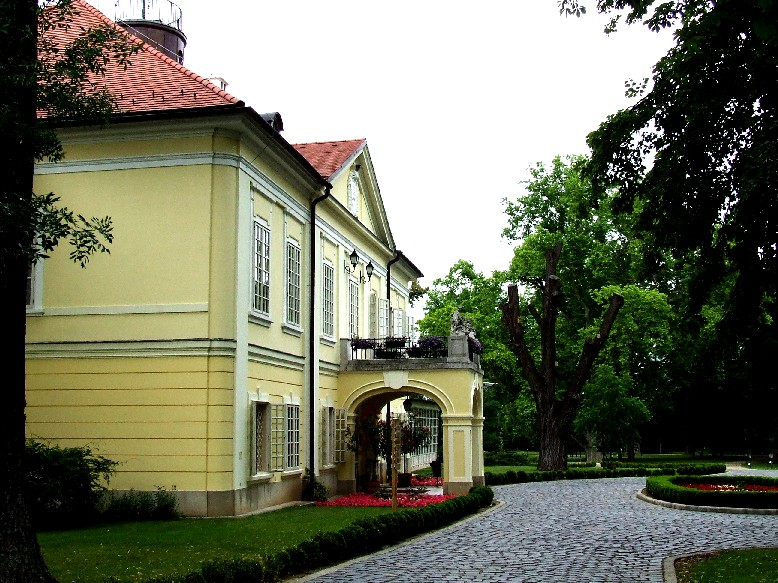 Felsőbüki-Nagy kastély, Röjtökmuzsaj. Saját kép. . Egresi János 2006. szeptember 23., 14:34 (CEST)